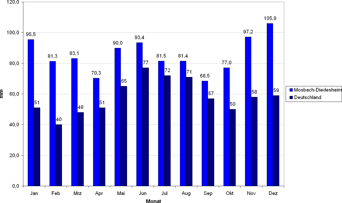 Niederschlagsmittelwerte_von_1961_bis_1990_an_der_DWD-Station_Mosbach-Diedesheim